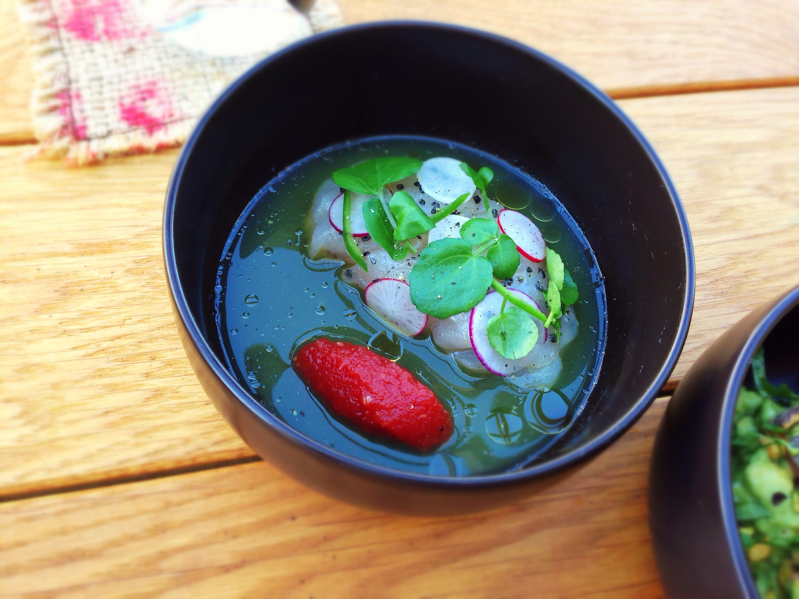 Taco Maria, Costa Mesa CA